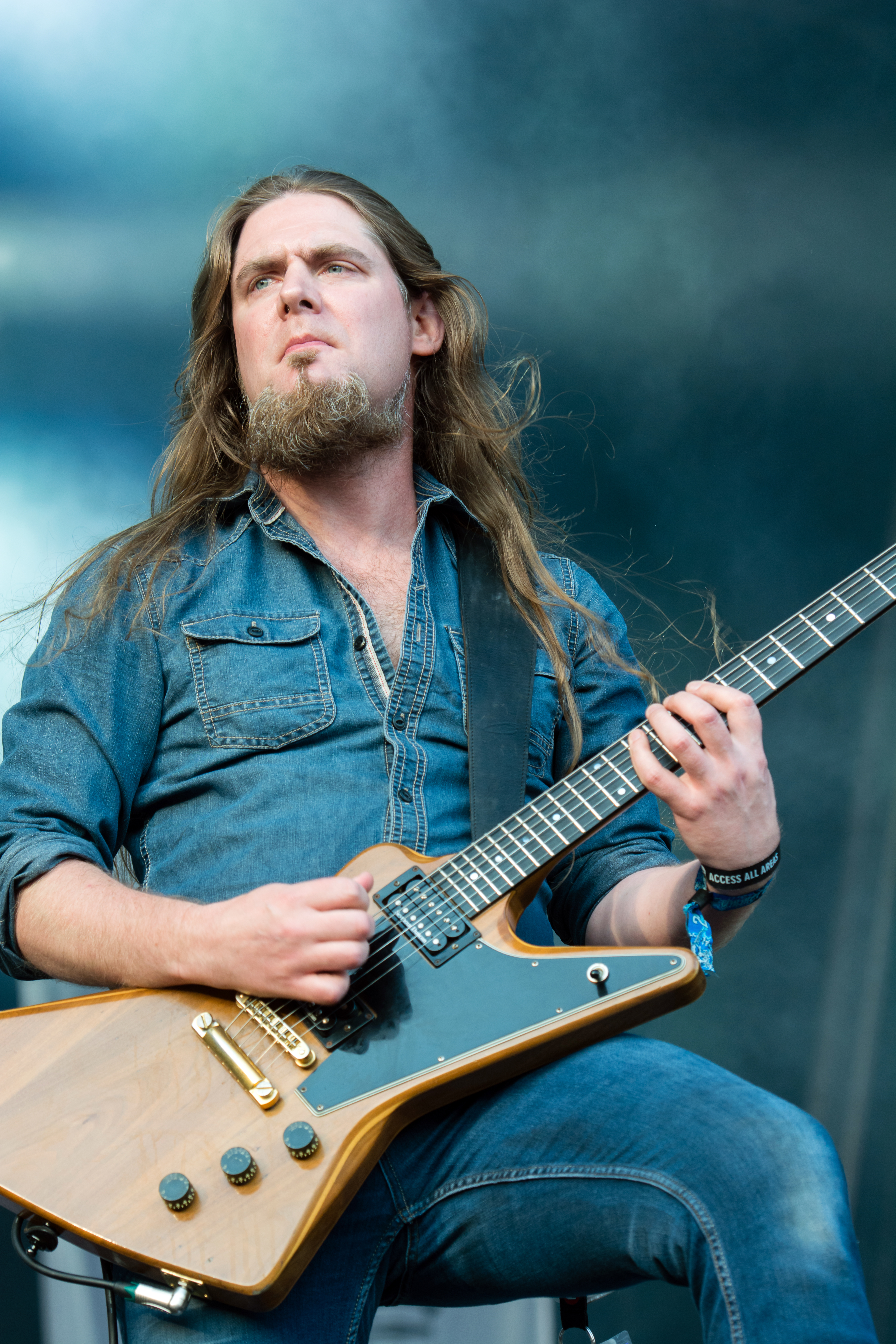 Carcass auf dem Elbriot 2016